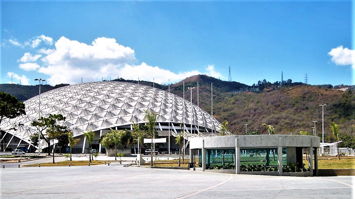 Vista frontal del Poliedro de Caracas